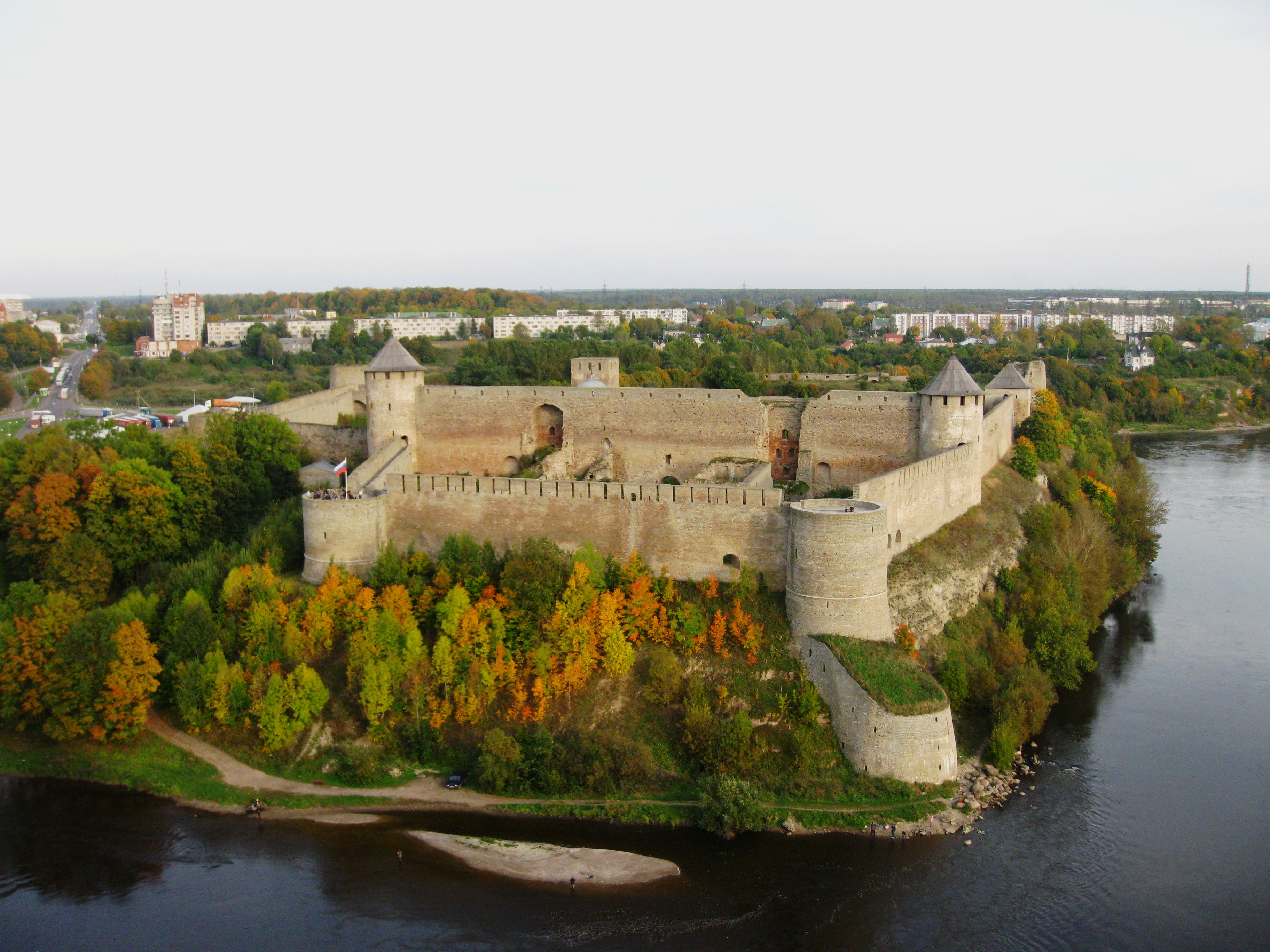 Ивангородская крепость